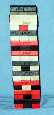 Turm aus Holzbausteinen des Spiels Jenga